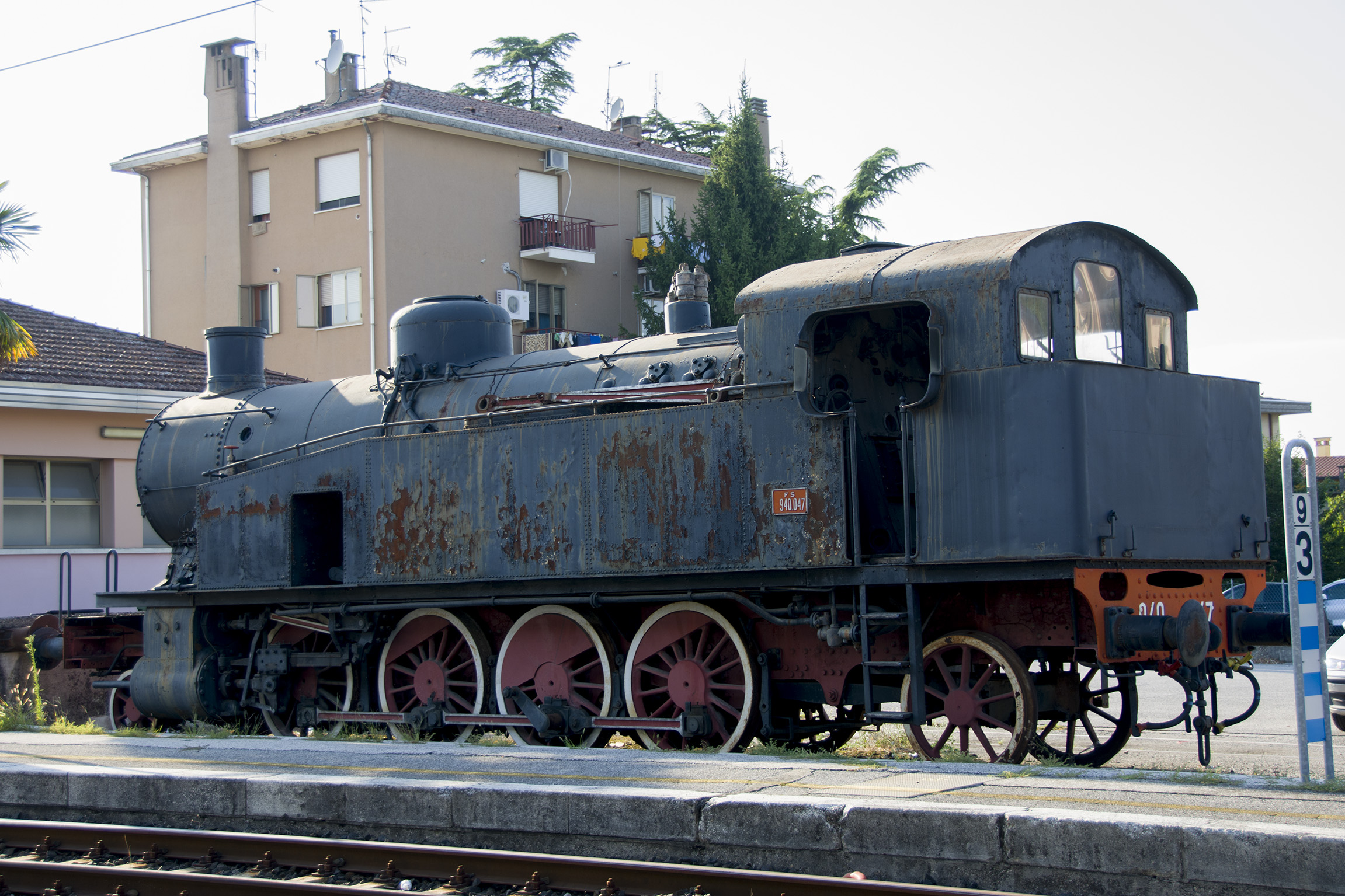 Locomotiva FS 940.047